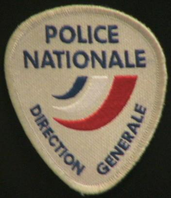 Blason des membres de la Direction Générale de la Police Nationale. Auteur : Korbus (